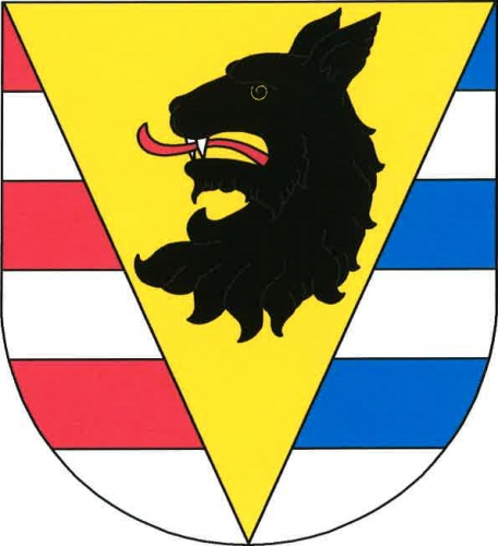 znak, Všetaty, okres Mělník